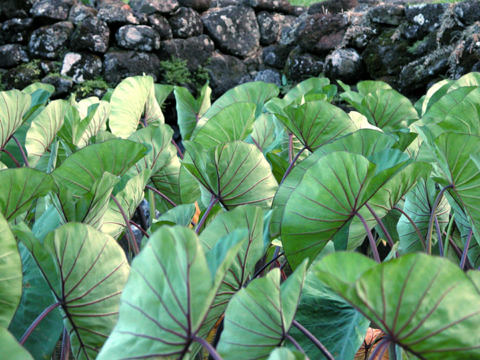 Taro leaves, Kauai, Hawaii